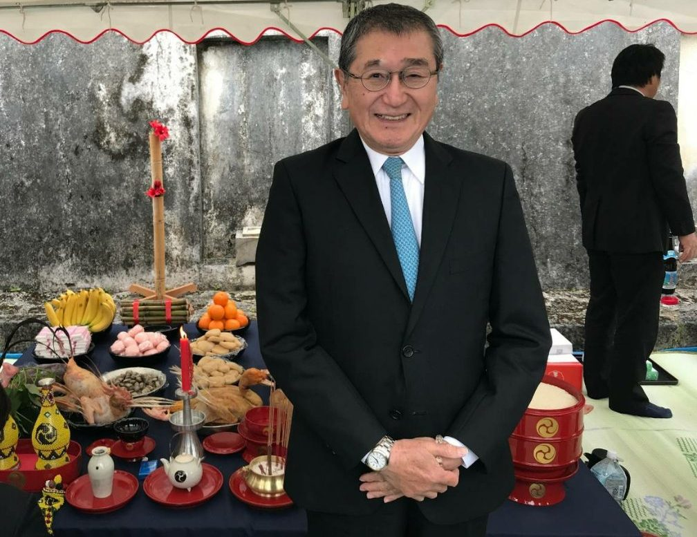 尚衛の近影写真